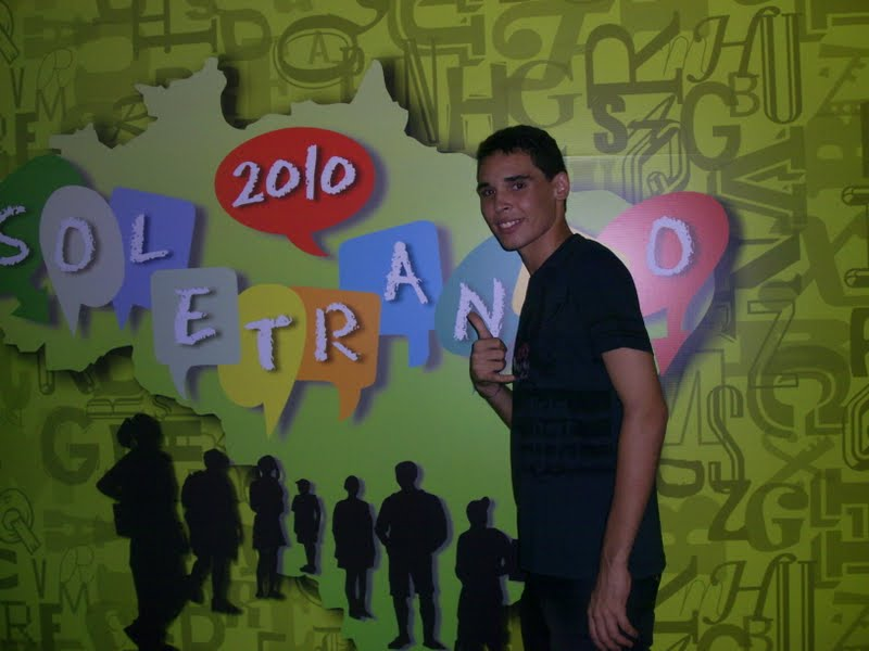 Estudante de Santana do Matos participa do programa Soletrando, na Rede Globo